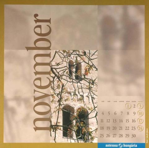 Calendar, November